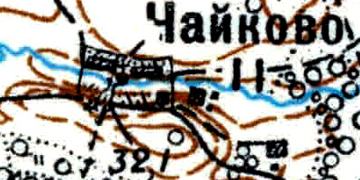 Топографическая карта Ленинградской области, квадрат Vc-29 (Батецкая), деревня Чайково